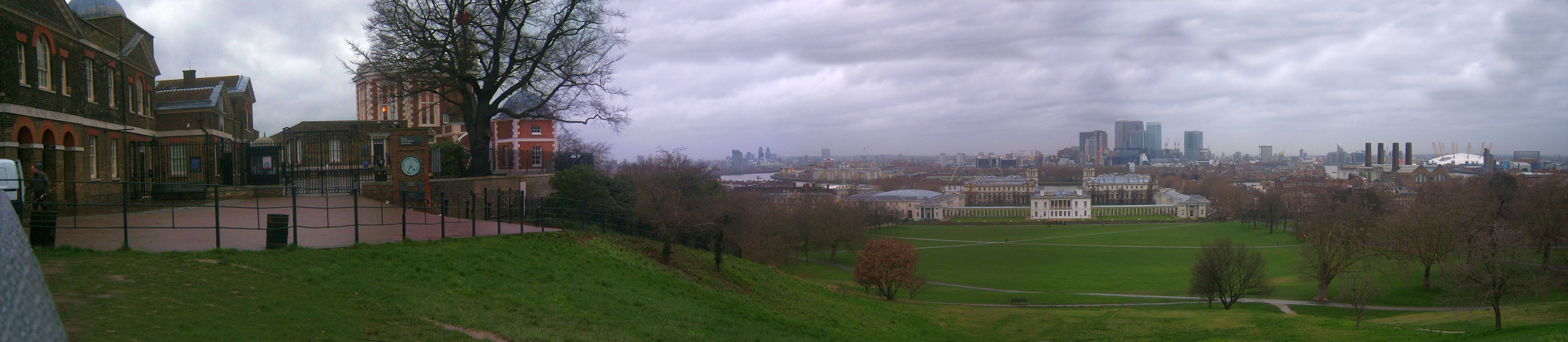 Greenwich